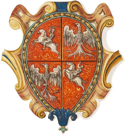 Герб великого князя литовского Жыгімонта Аўгуста (Žygimont Aŭgust) з «Пагоняй» («Pahonia») Беларуская (тарашкевіца): Герб вялікага князя літоўскага Сигизмунда II Августа